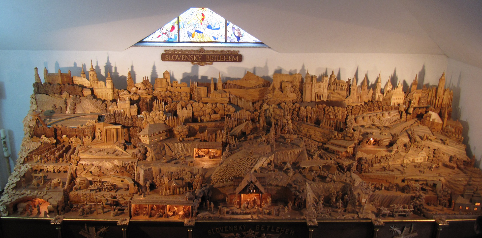 Slovenský betlehem v Rajeckej Lesnej